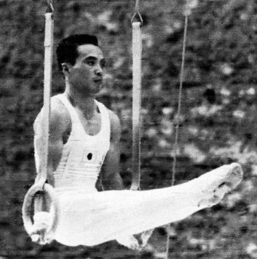 Nobuyuki Aihara